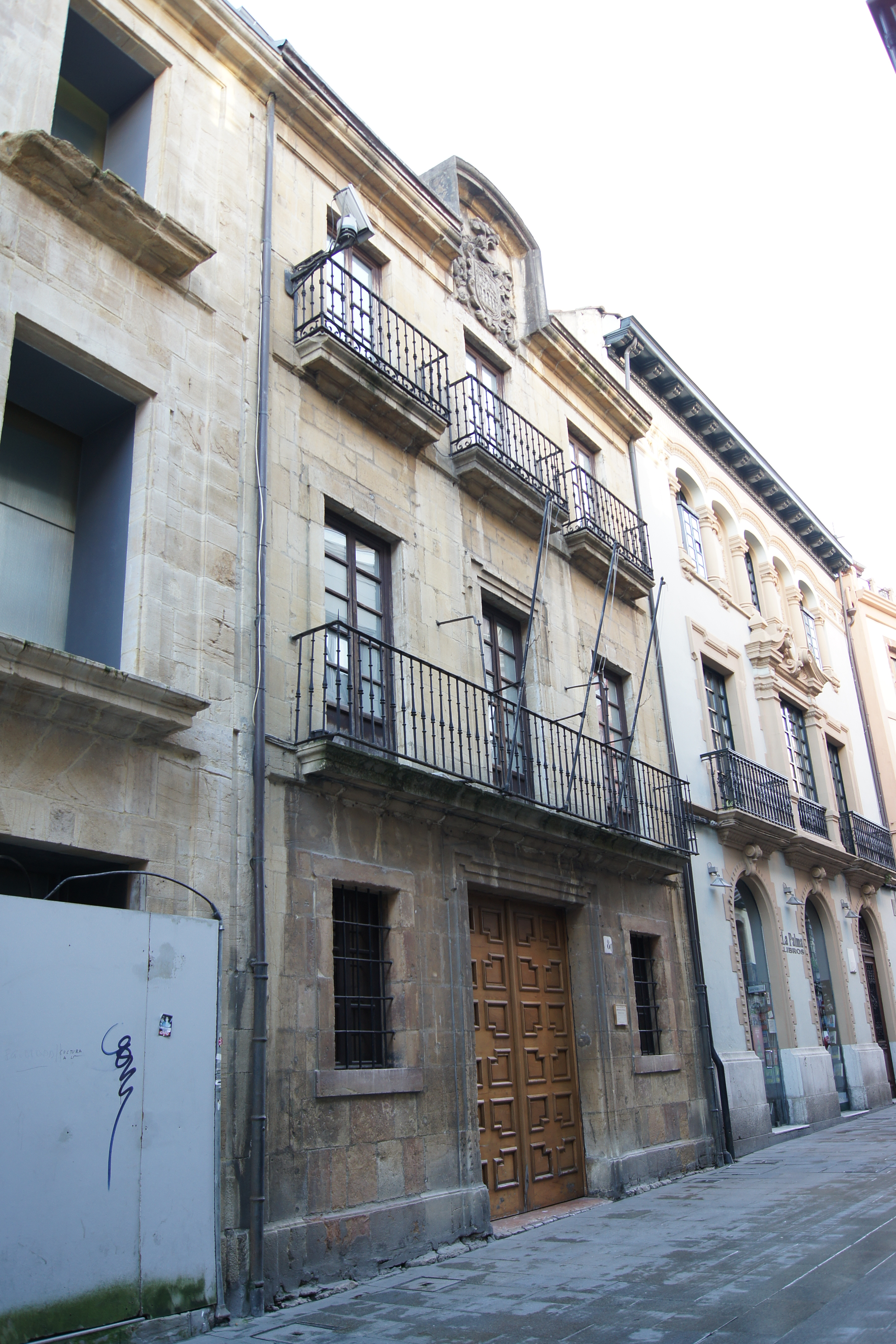 Casa de Oviedo-Portal en la ciudad de Oviedo, Principado de Asturias, España. Del siglo XVII, alberga el Museo de Bellas Artes de Asturias